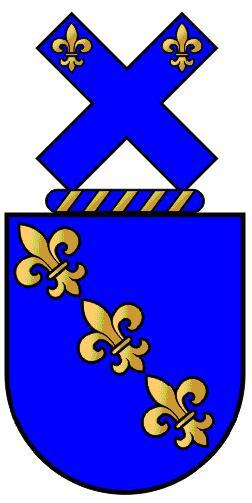 Paiva chefe armas